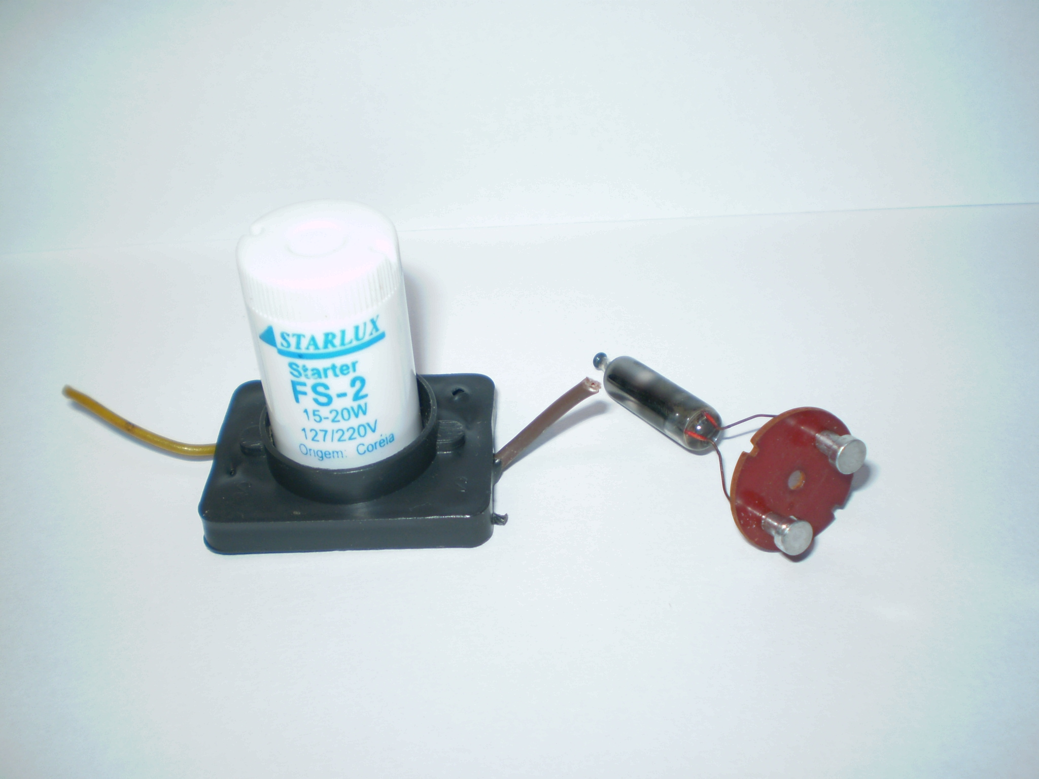 Equipamento elétrico STARTER para iluminação fluorescente